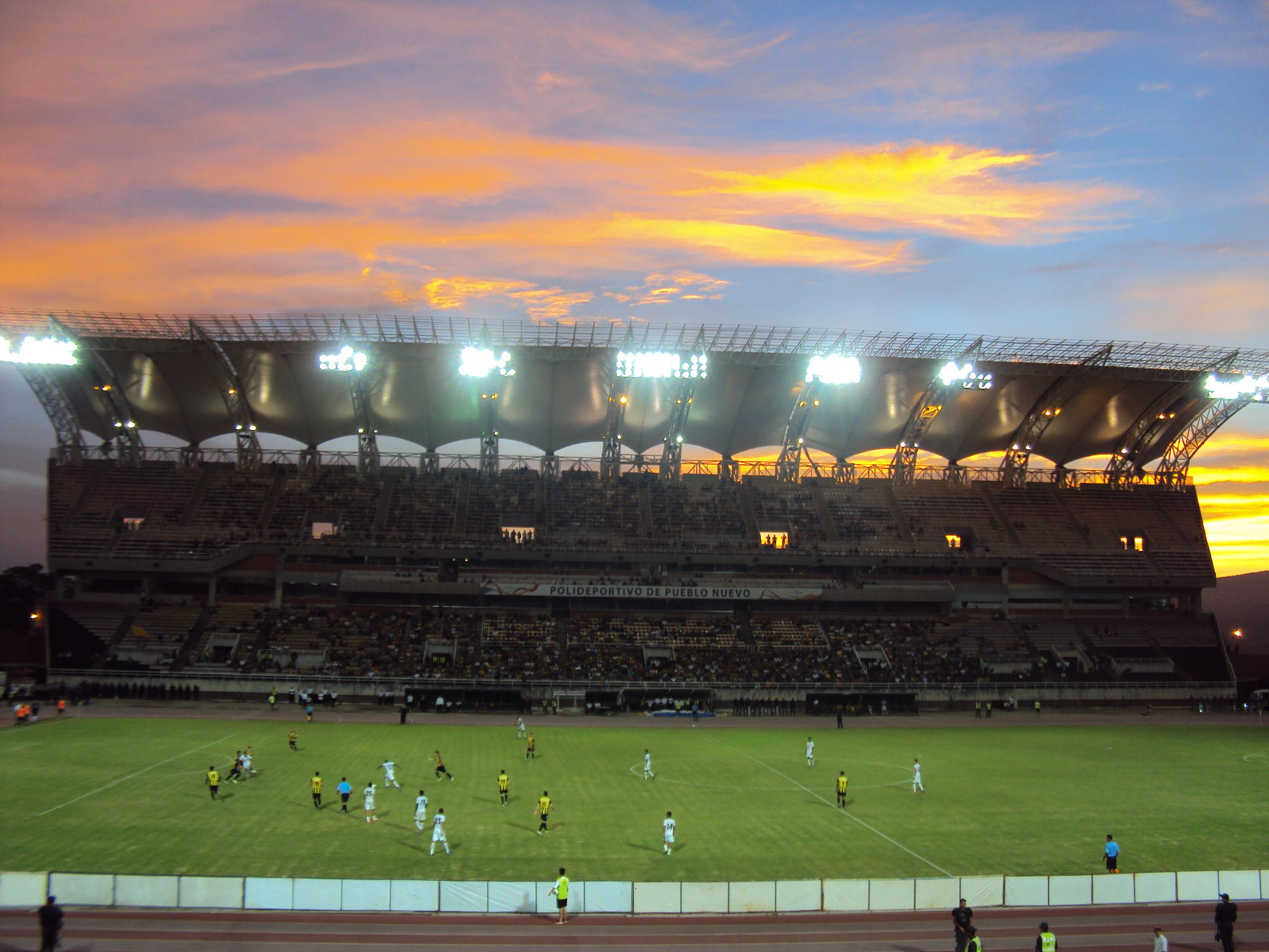 Tachira, Venezuela